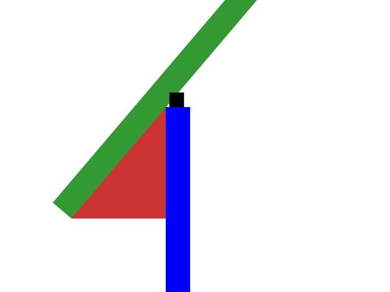 Dachkasten roof, house